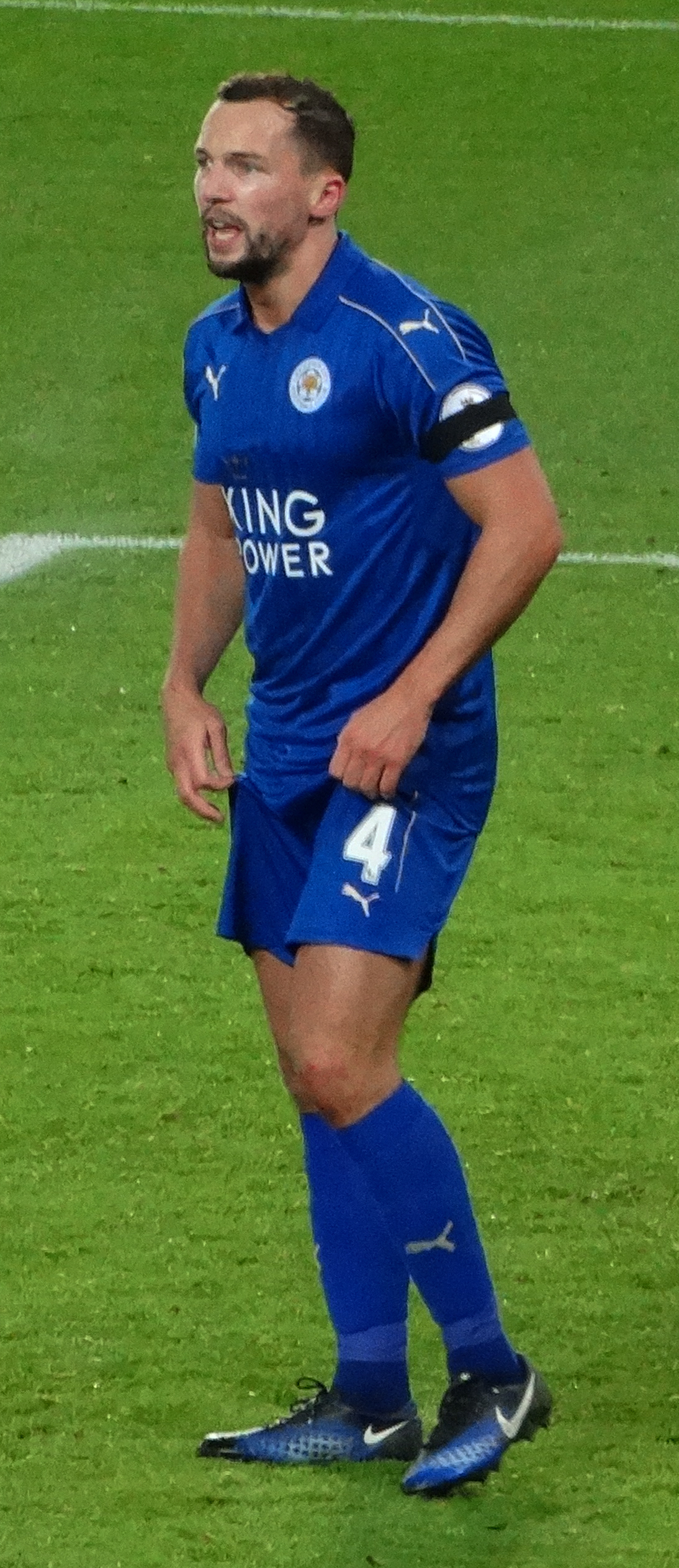 لما السجارة انطفت الصحاب اختفت